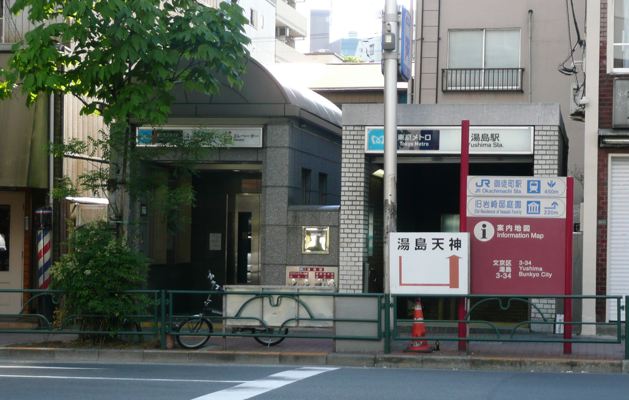 湯島駅3番出入口